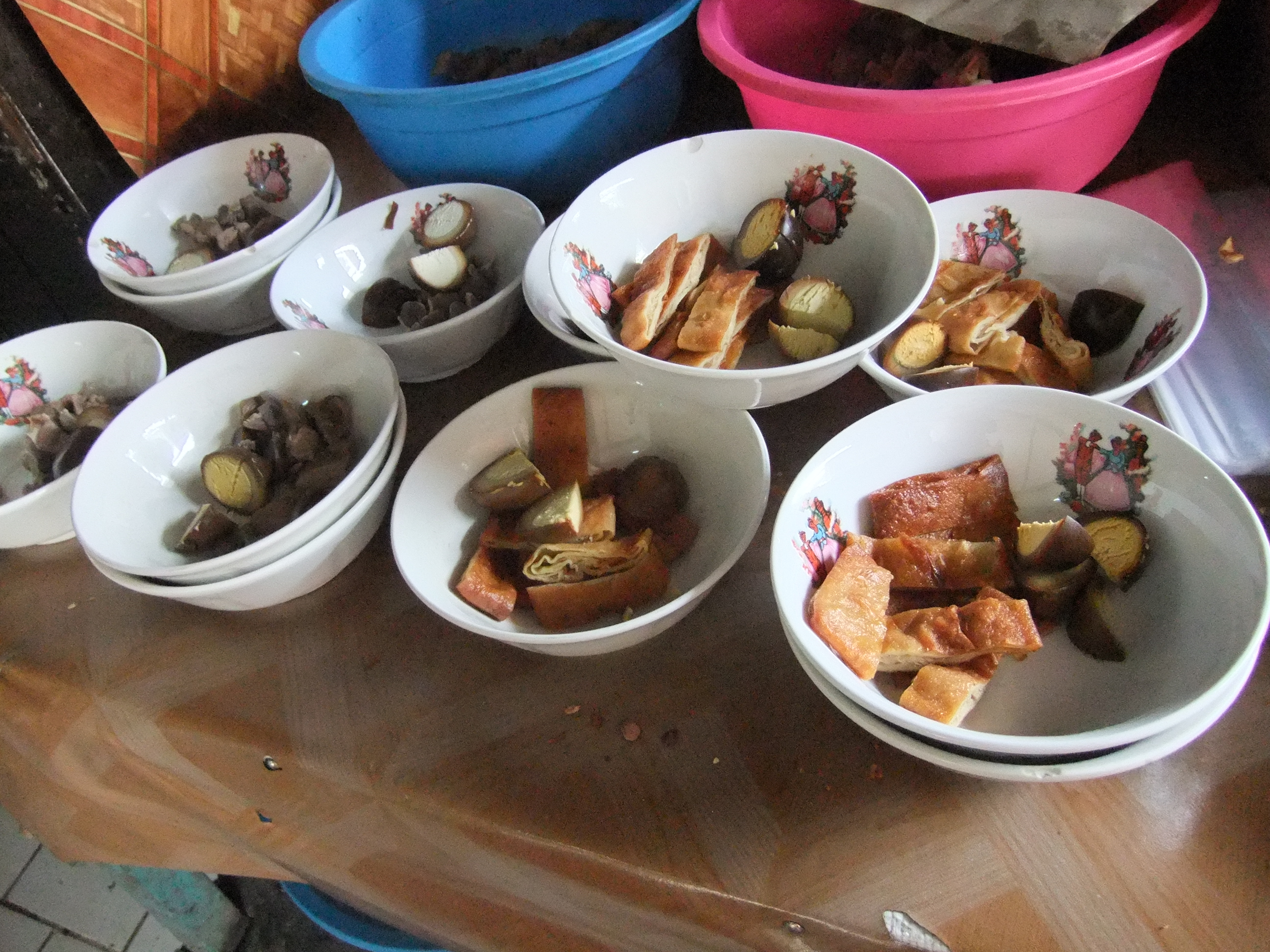 Timlo Solo sebelum diberi kuah